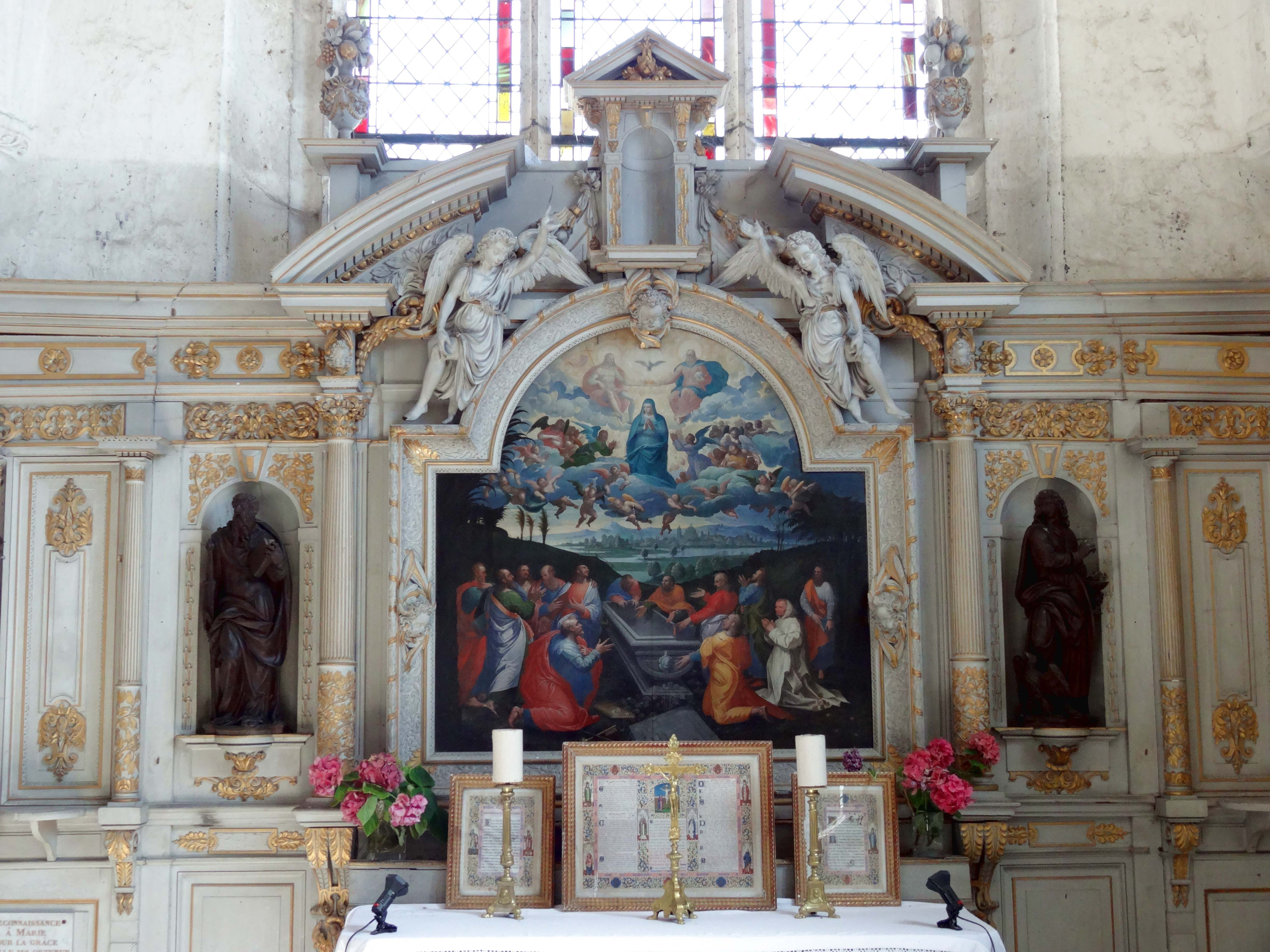 Mobilier de l'église - voir titre.